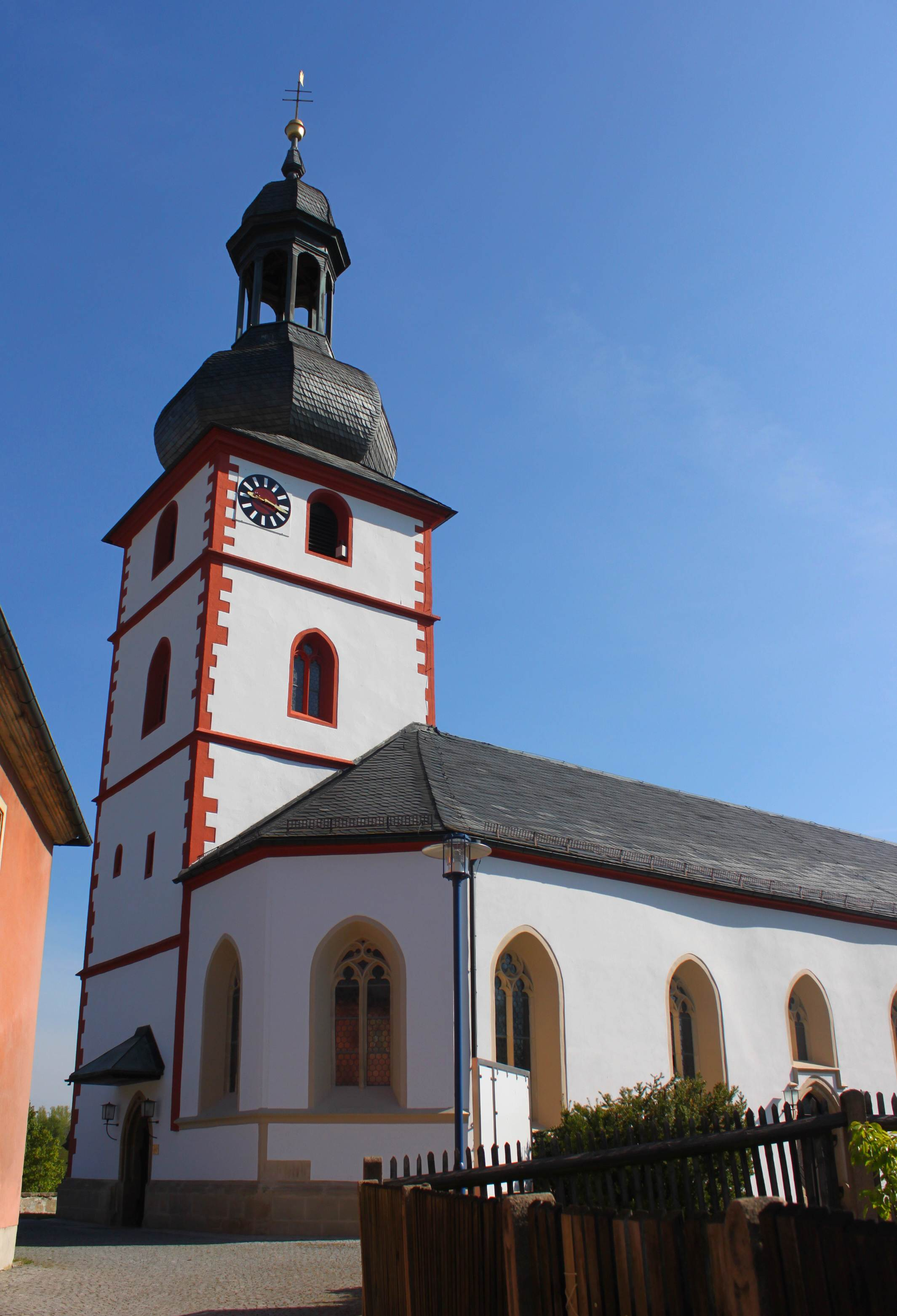 Die katholischen Pfarrkirche St. Jakobus wurde um 1500 neu gebaut